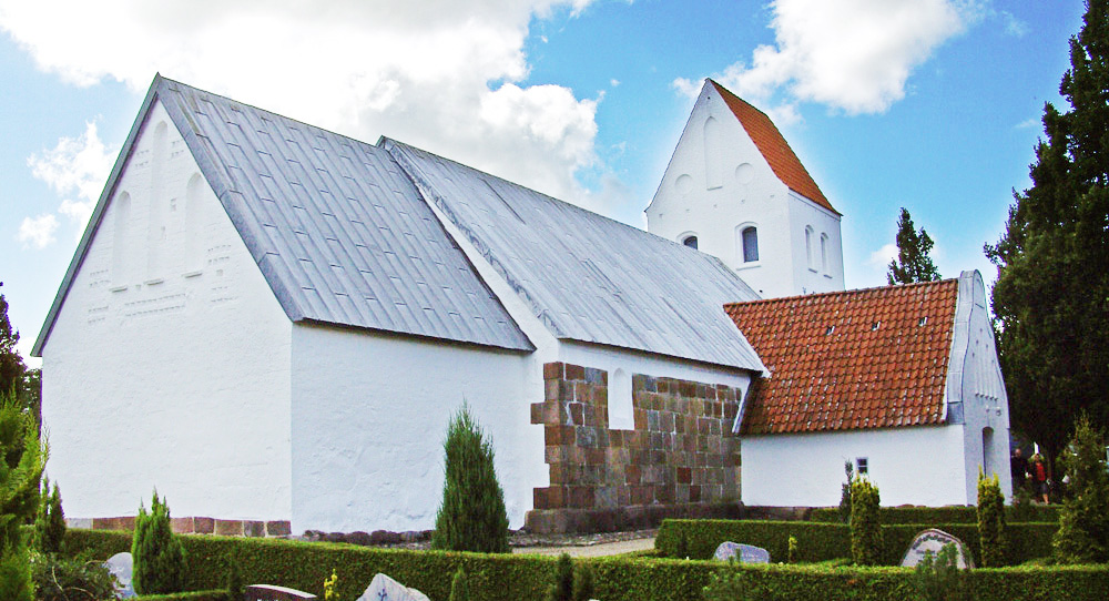 fra sydøst